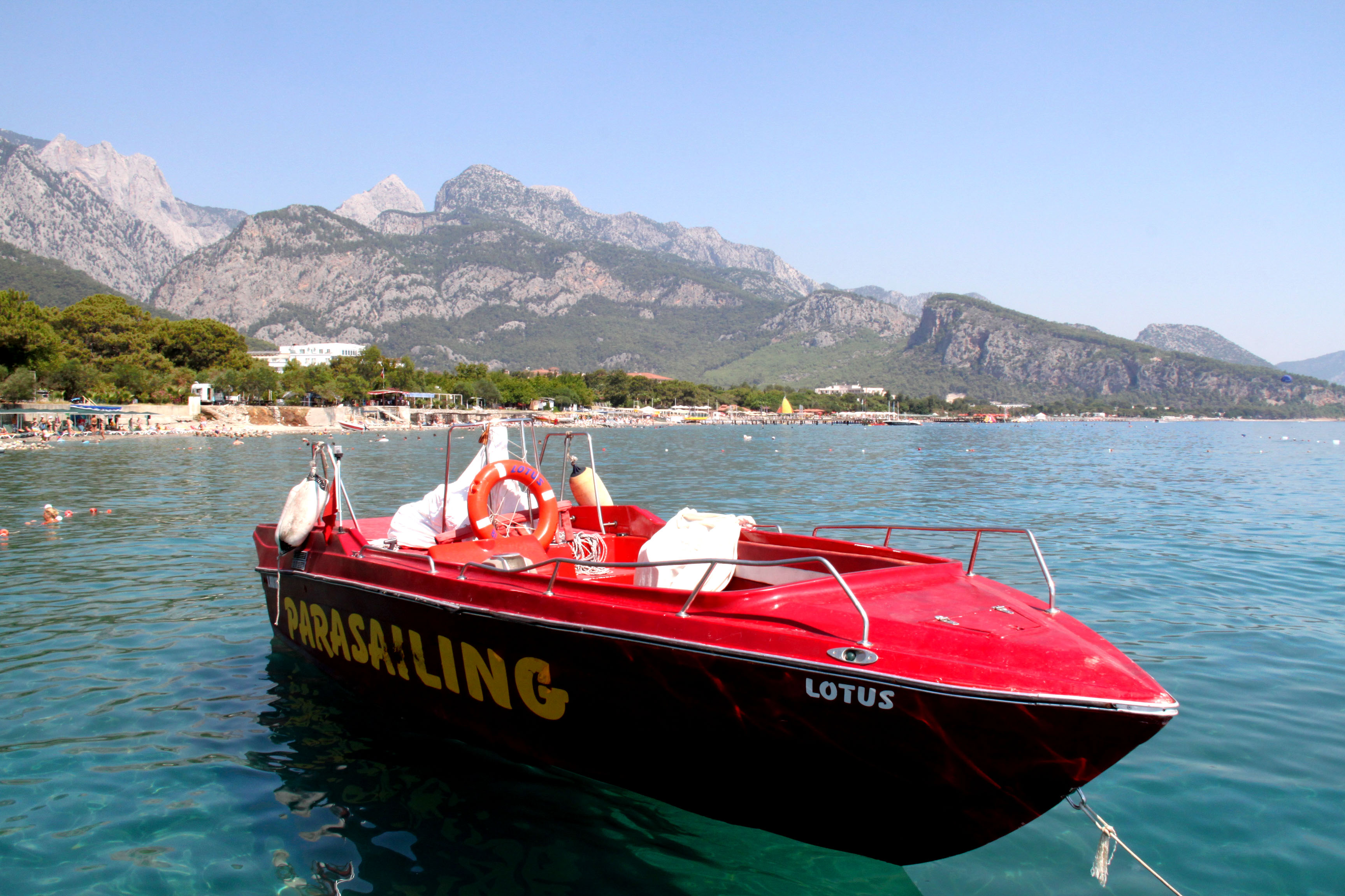 Катер для парасейлинга в Бельдиби